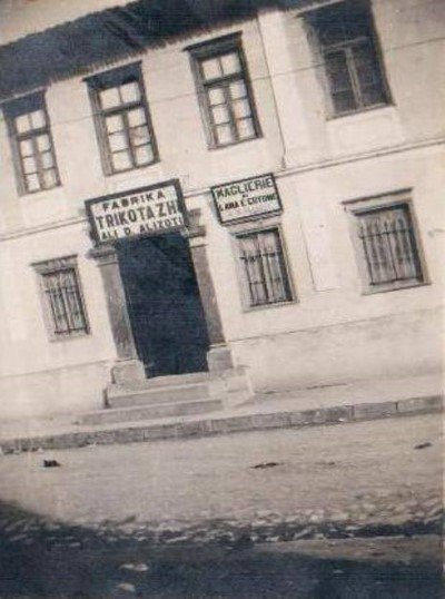 Nje foto nga jashte fabrikes se pare te Trikotazhit ne Korce